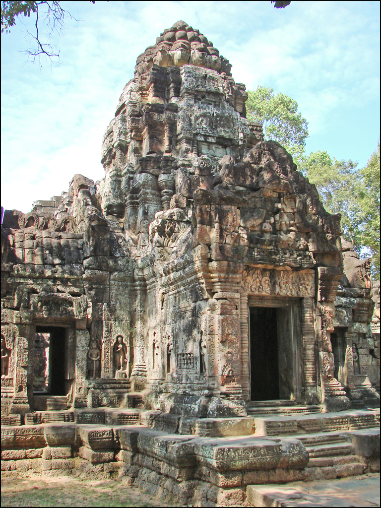 Gopura intérieur avec une tour à faux étages du temple Ta Som Ta Som était un temple dédié au culte bouddhique du Mahâyâna (Grand Véhicule). Son constructeur est le grand roi Jayavarman VII (1181-1218) Le temple date de la fin du XIIème siècle - début du XIIIème siècle. Il est dans le style du Bayon et comme ce dernier, il comprend des tours à visages. Son nom moderne "Ta Som" signifie "Vieux Som" mais il s'appelait "le joyau de l'éléphant blanc fortuné" (Gaurashri Gajaratna). Il abritait 22 divinités. Ce petit temple était une annexe du grand temple Preah Khan, il a été construit dans l'alignement de ce dernier et du Neak Pean sur le bord oriental du bassin-réservoir (Baray) Jayatataka. Ta Som comprend trois enceintes. L'enceinte extérieure (240m par 200m) comprend deux gopura(s) avec des tours à visages situés à l'est et à l'ouest. A l'intérieur de la première enceinte, des douves entourent la deuxième enceinte du temple qui possède deux gopuras. également orientés à l'est et à l'ouest. Une galerie dotée de quatre gopura(s) et de quatre tours d'angle constitue la troisième enceinte, elle entoure la tour-sanctuaire centrale du temple . Article Wikipedia sur le temple Ta Som